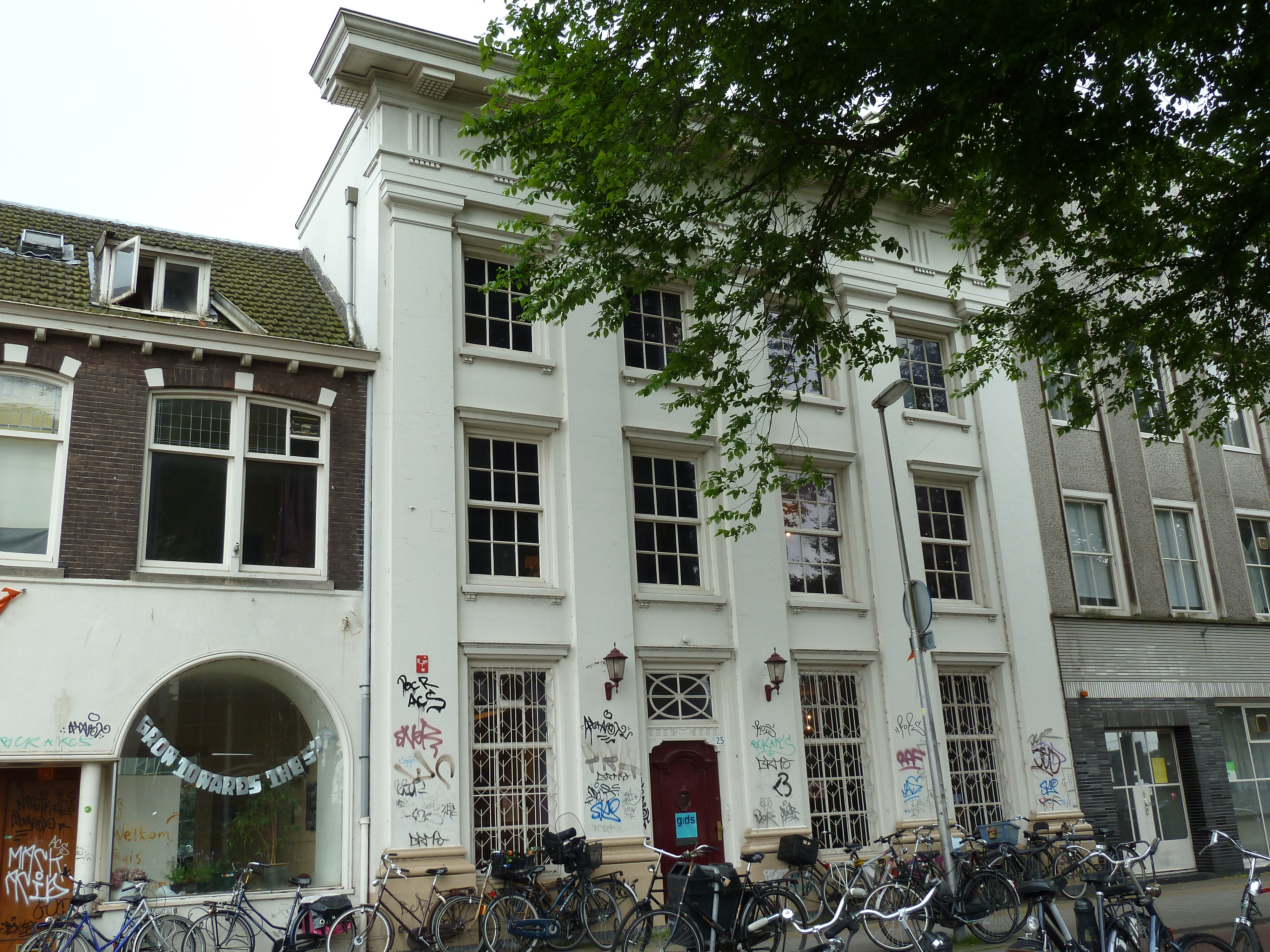 Van Sijpesteijnkade 25, Utrecht, NL. Rijksmonument.